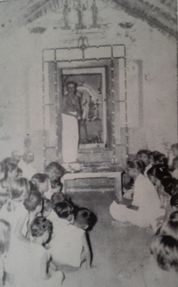 1976 ஆம் ஆண்டு இக்கல்லூரியின் முதலாவது விஐயதசமி பூசை கொண்டாட்டம்